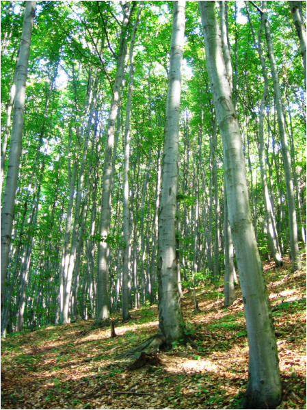 Kilátás a kisvasútból a Garadna-völgyben (Lillafüredi Állami Erdei Vasút)